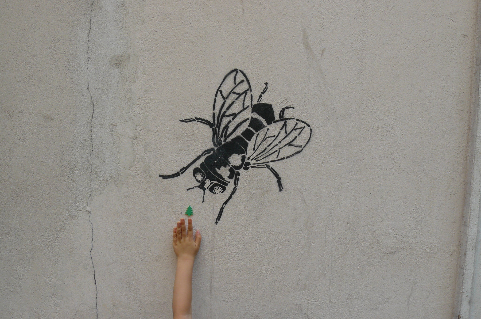 Graffiti - Poznań, ul. Kramarska.